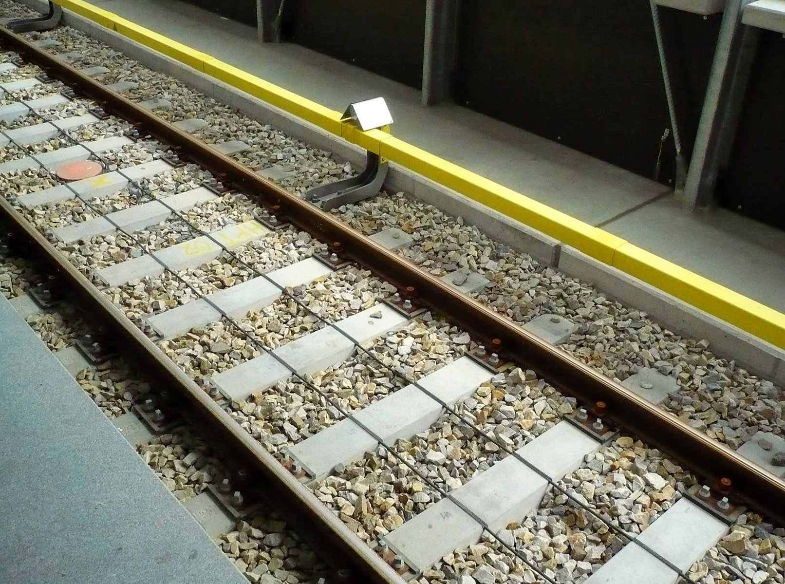 wien 023